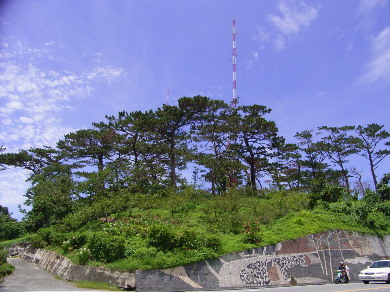 台湾花蓮市美崙山。日本統治時代に植えられた黒松